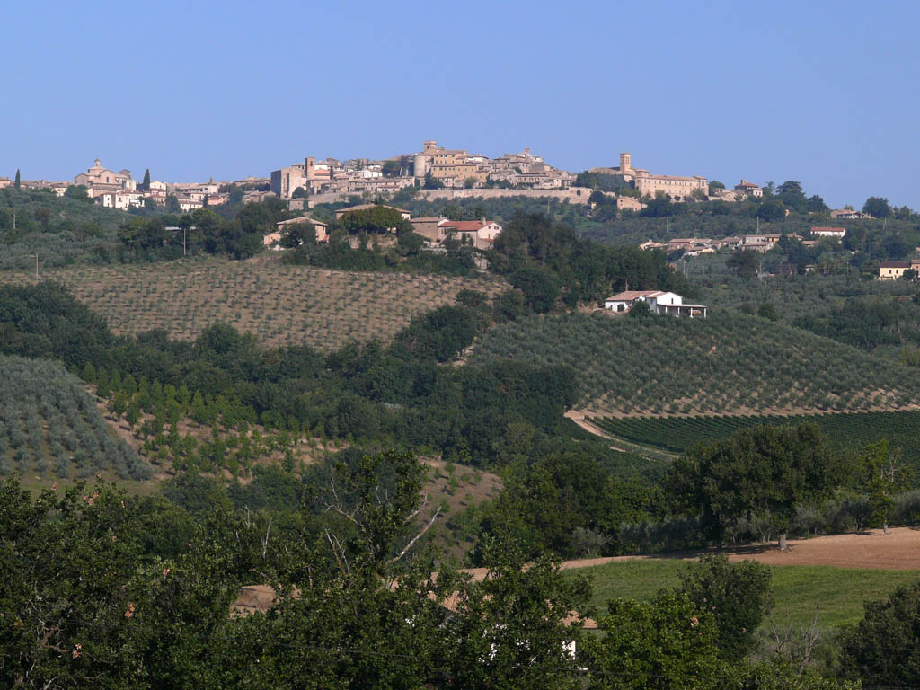 Montefalco, view